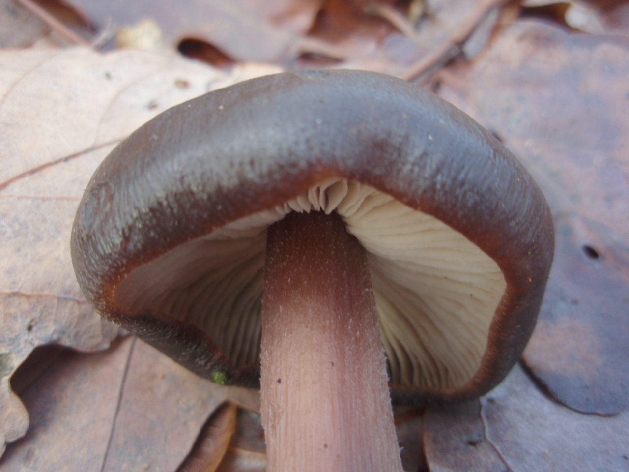 Penízovka kuželovitá, Ciboušov, Krušné horyLatina: Rhodocollybia butyracea